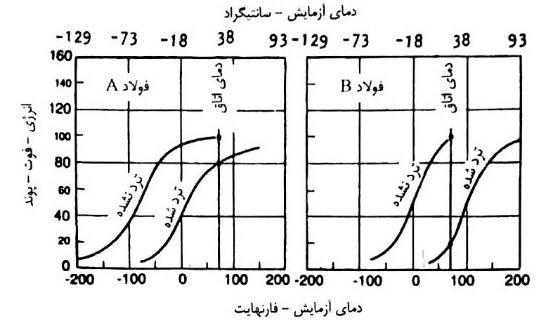 مقایسه جابجایی دمای تبدیل در اثر ترد شدن برای دو فولاد A,B